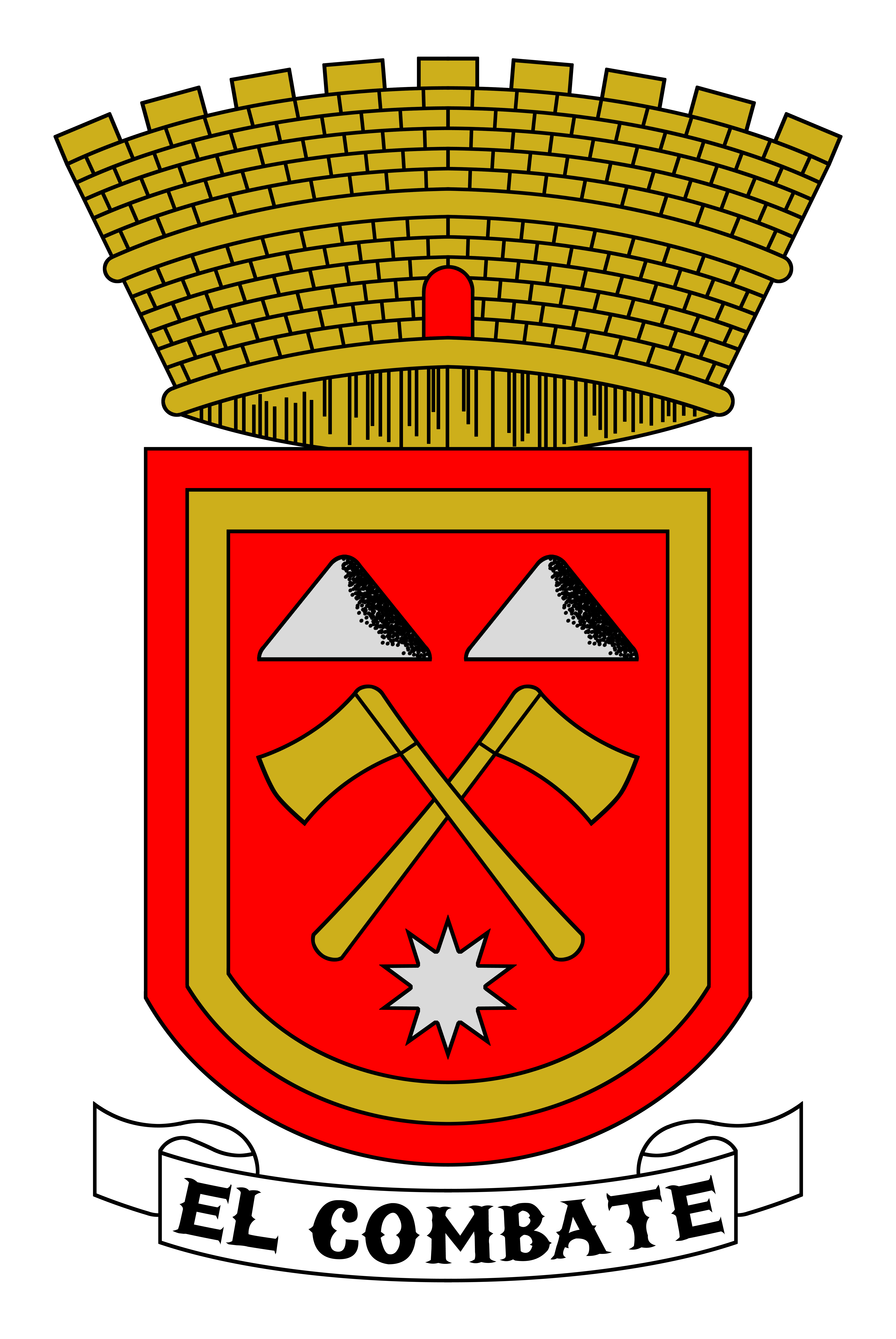 Escudo del Poblado El Combate